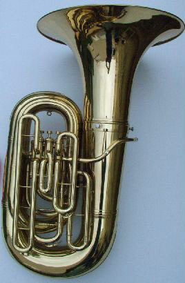 A Conn BBb tuba model 25J